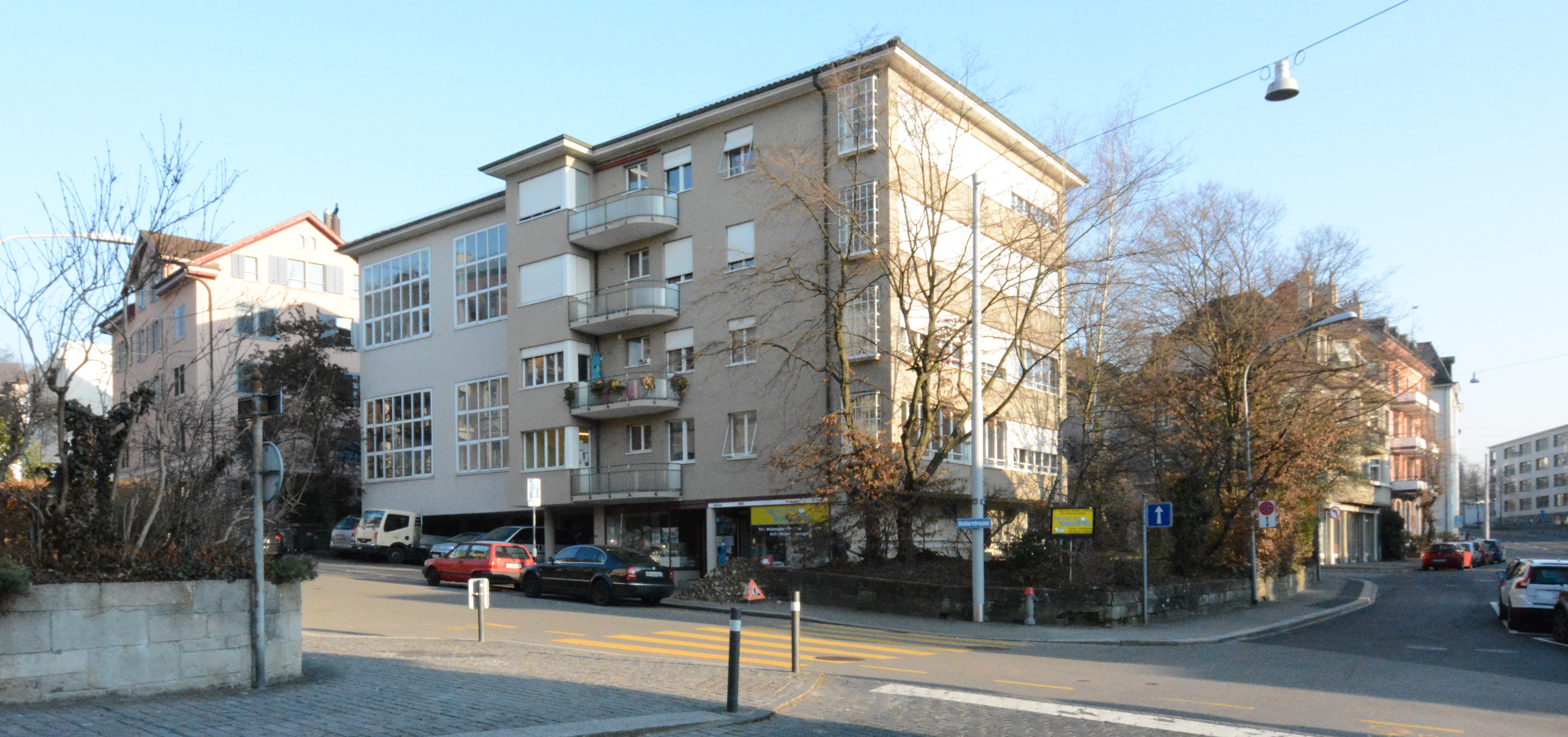 Atelierhaus Dolderstrasse, Zürich, 1941. Architekt: Frey und Schindler